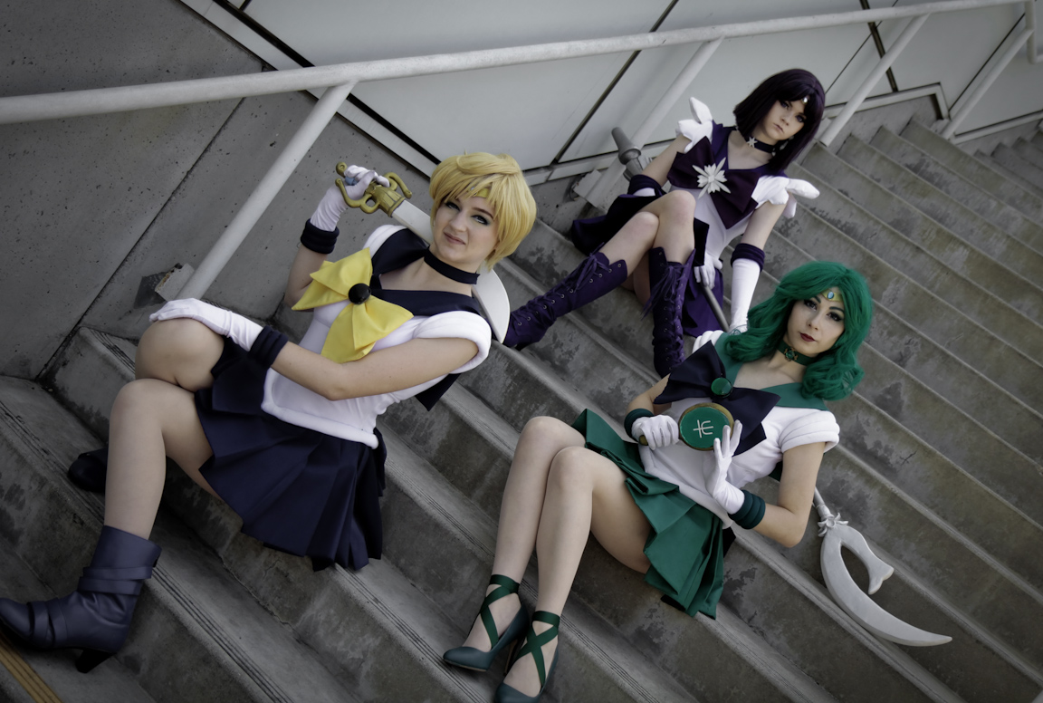 Anime Expo 2016，《美少女戰士》cosplayer群。